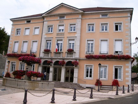 Façade de la Mairie d'Arbent